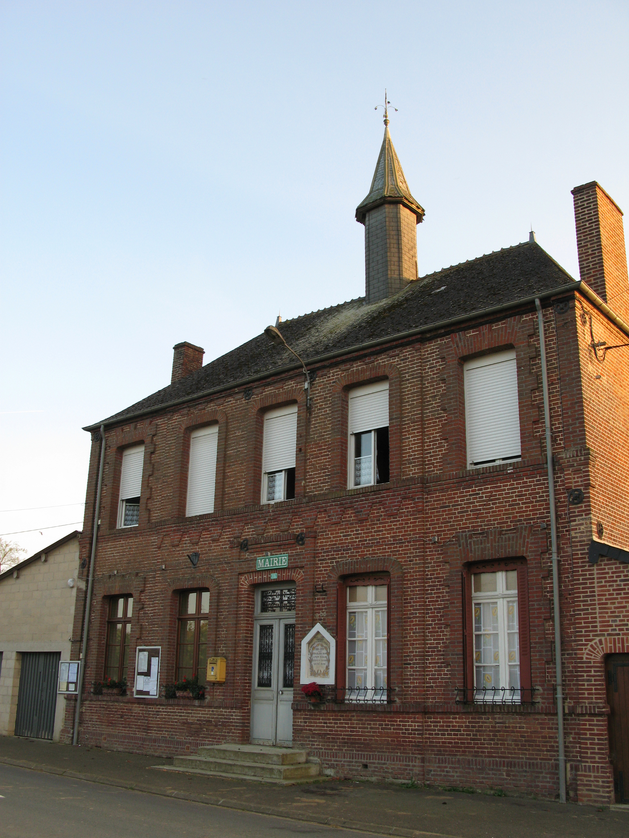 Raillimont (Aisne, France) - La mairie.